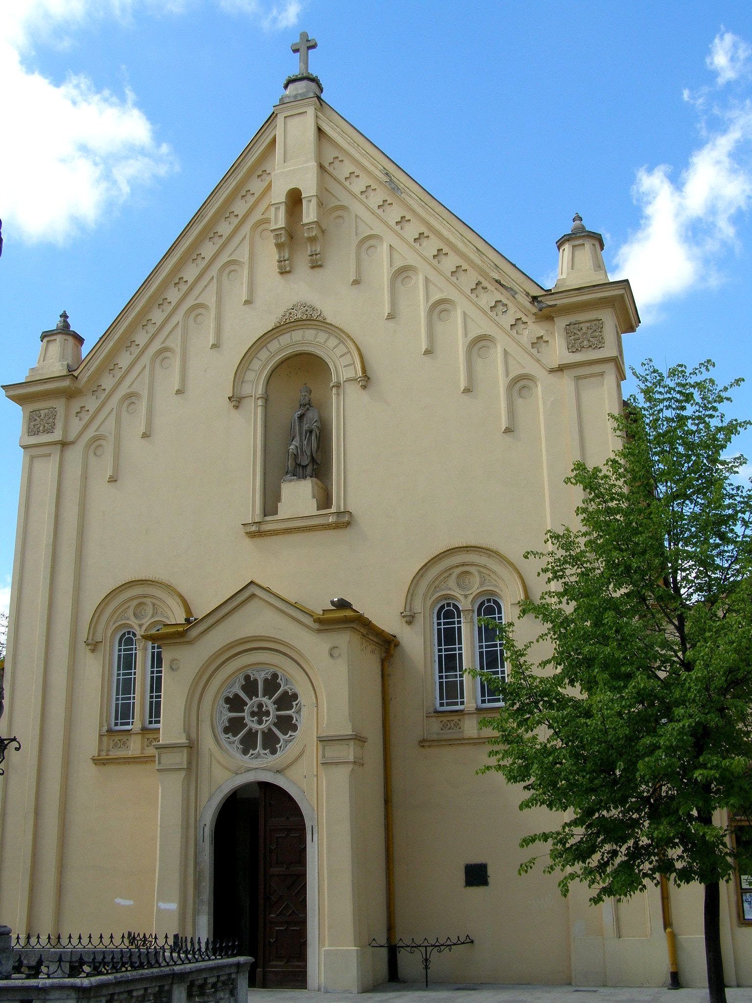 Priečelie kostola sv. Štefana v Bratislave This medium shows the protected monument with the number 101-169/2 in the Slovak Republic.